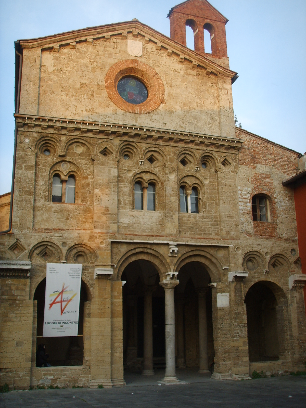 Abbazia_di_san_zeno in PIsa